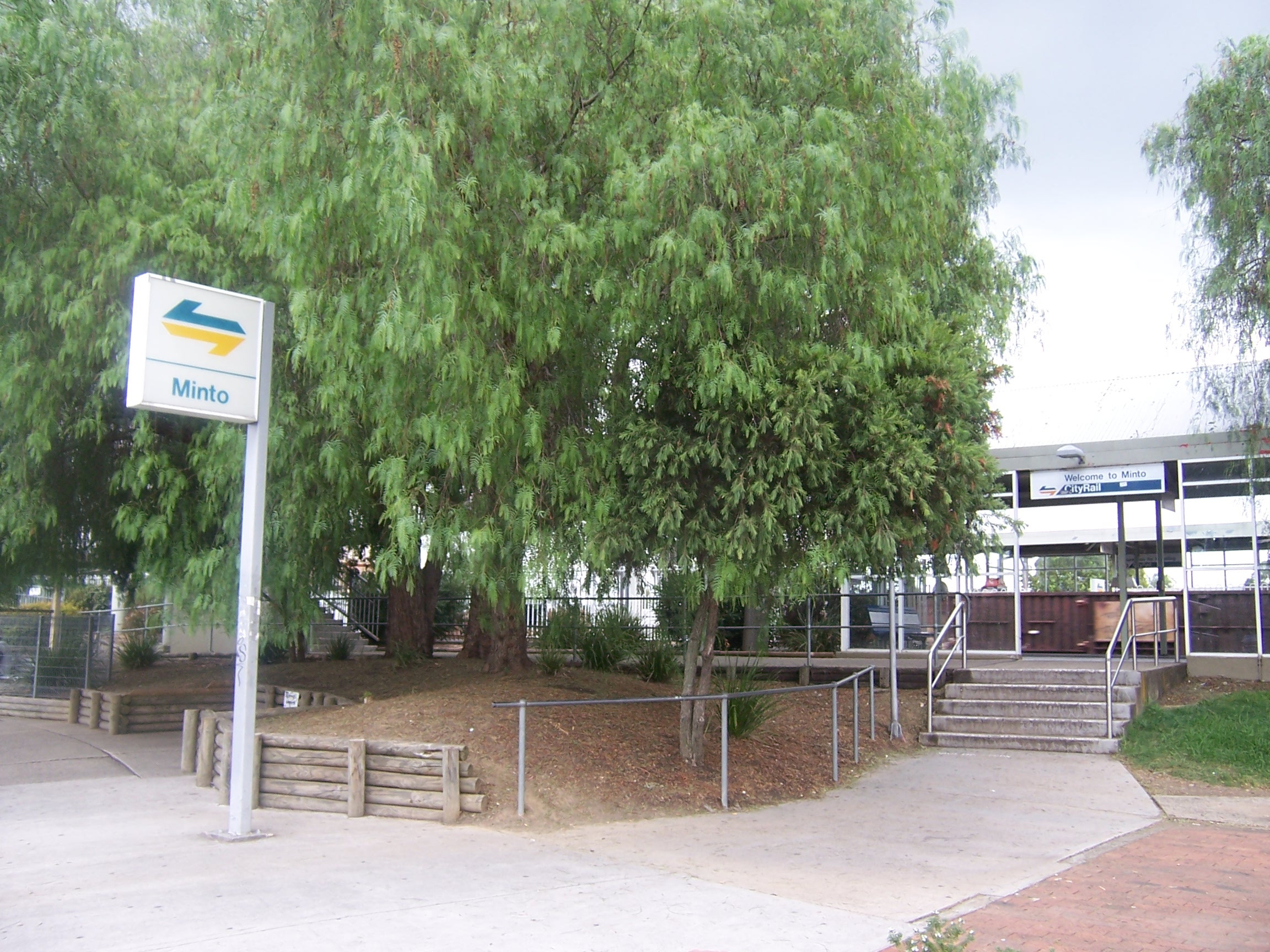 Minto Station